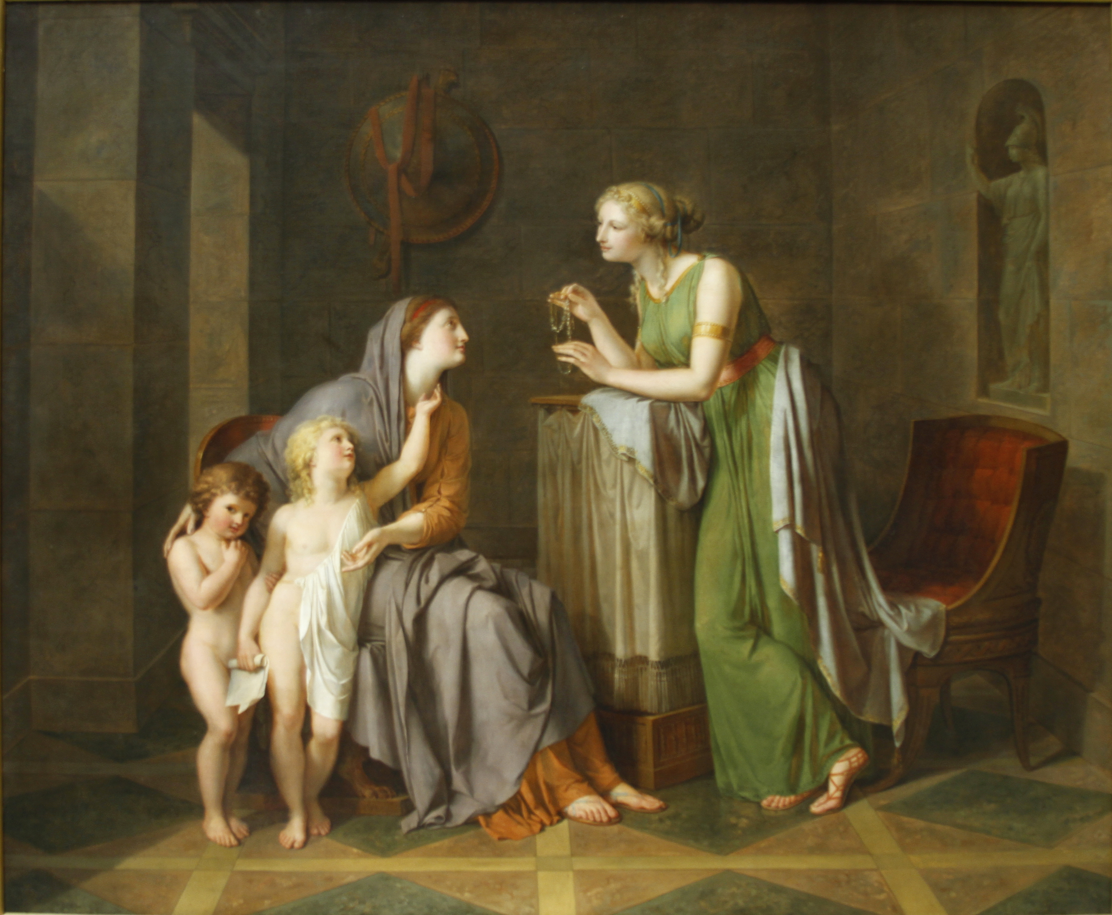 Cornelia, die Mutter der GracchenCornelia, Mother of the Gracchititle QS:P1476,de:"Cornelia, die Mutter der Gracchen" label QS:Lde,"Cornelia, die Mutter der Gracchen" label QS:Len,"Cornelia, Mother of the Gracchi"